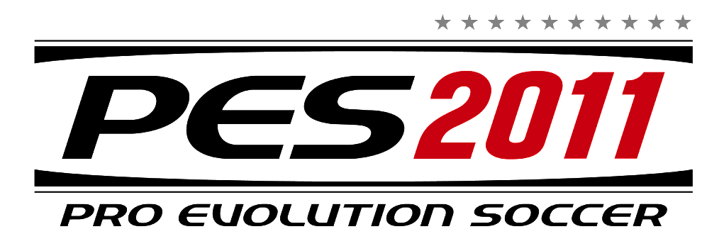 El logo de Pro Evolution Soccer 2011.